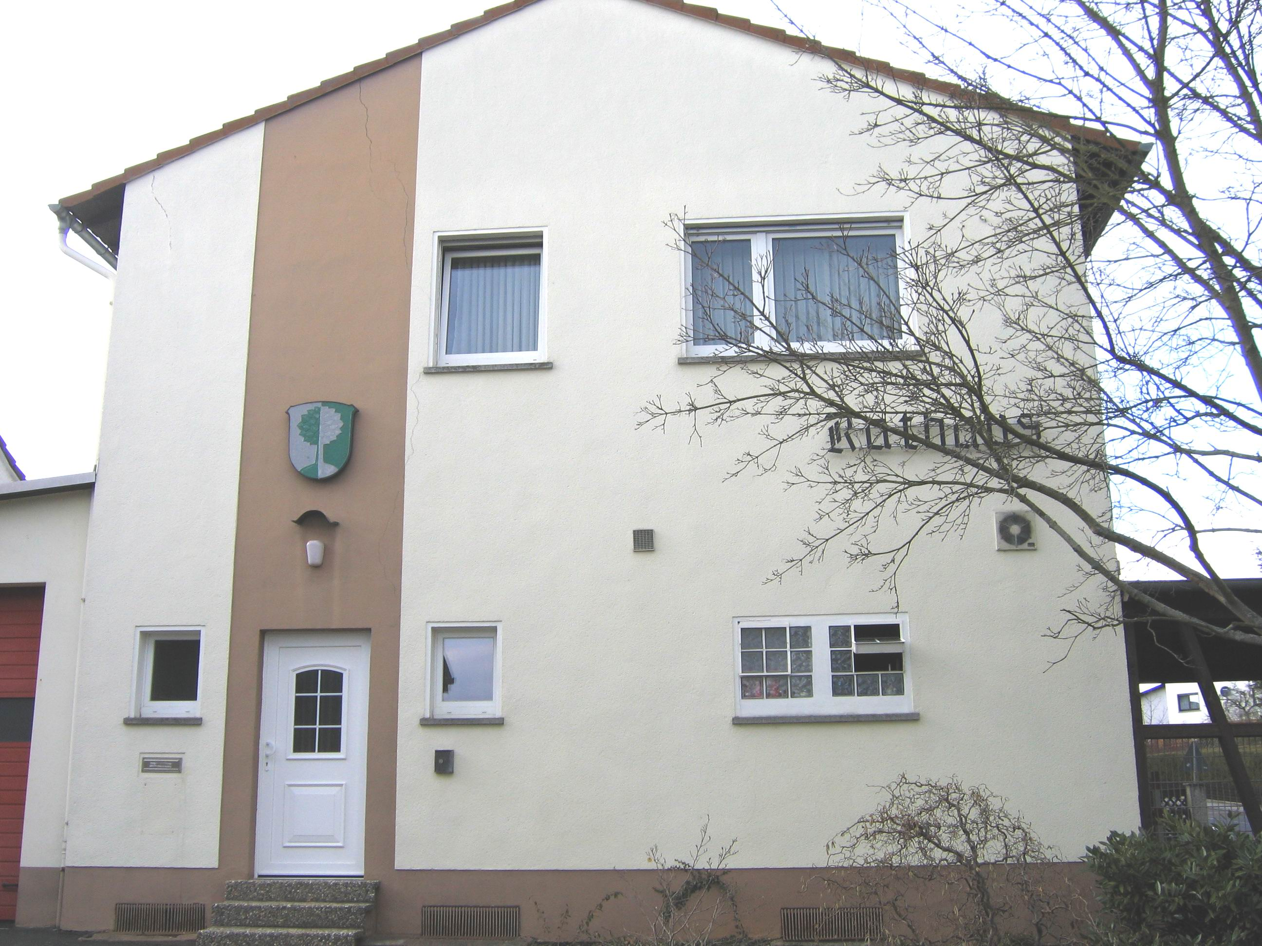 Altes Rathaus von Dietkirchen, später Verwaltungsstelle, selbst fotografiert von Ludwig Ries am 13.3.2005, Lizenzart GNU-Lizenz